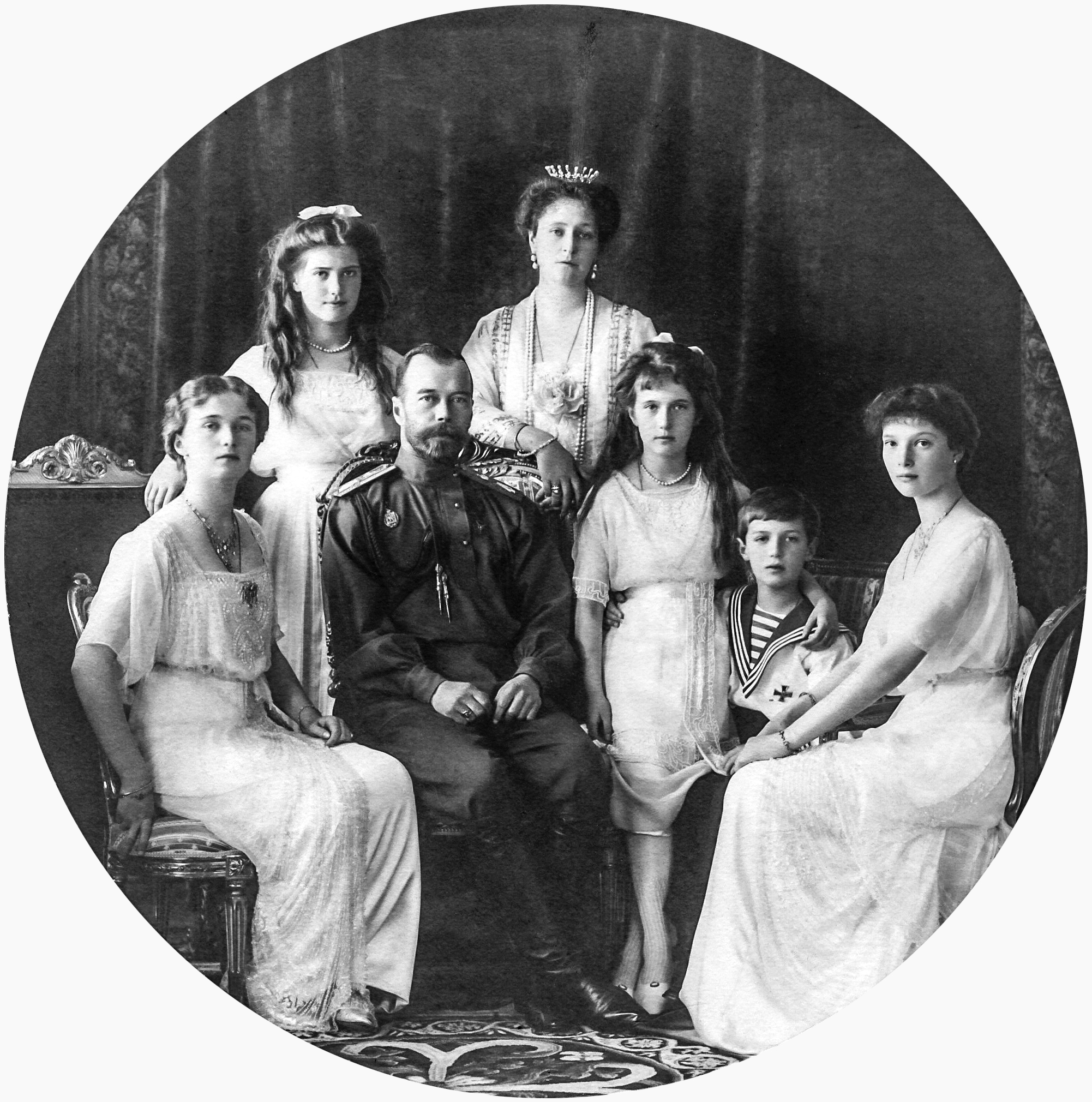 Russische Zarenfamilie Scherl Bilderdienst Nikolaus II. und Familie [Russland.- Zar Nikolaus II. mit seiner Familie, Frau Alexandra, Töchter Olga, Tatjana, Maria, Anastasia und Sohn Alexej] Abgebildete Personen: Nikolaus II.: Rußland, Zar, II., Russland